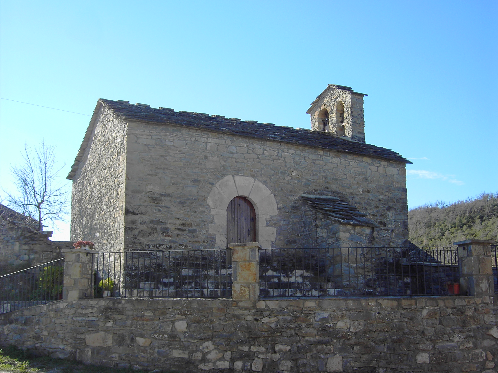 Capilla en el caserío de Castellazo, en el Biello Sobrarbe.